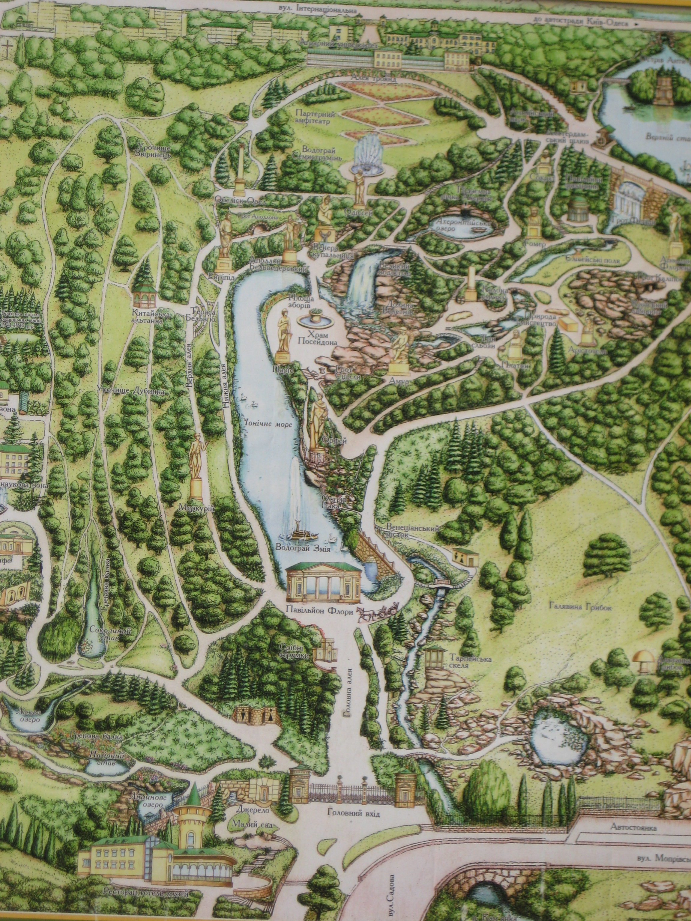 Парк „Софіївка" з комплексом водойм, паркових будівель, споруд і скульптур, Умань, Садова вул., 55